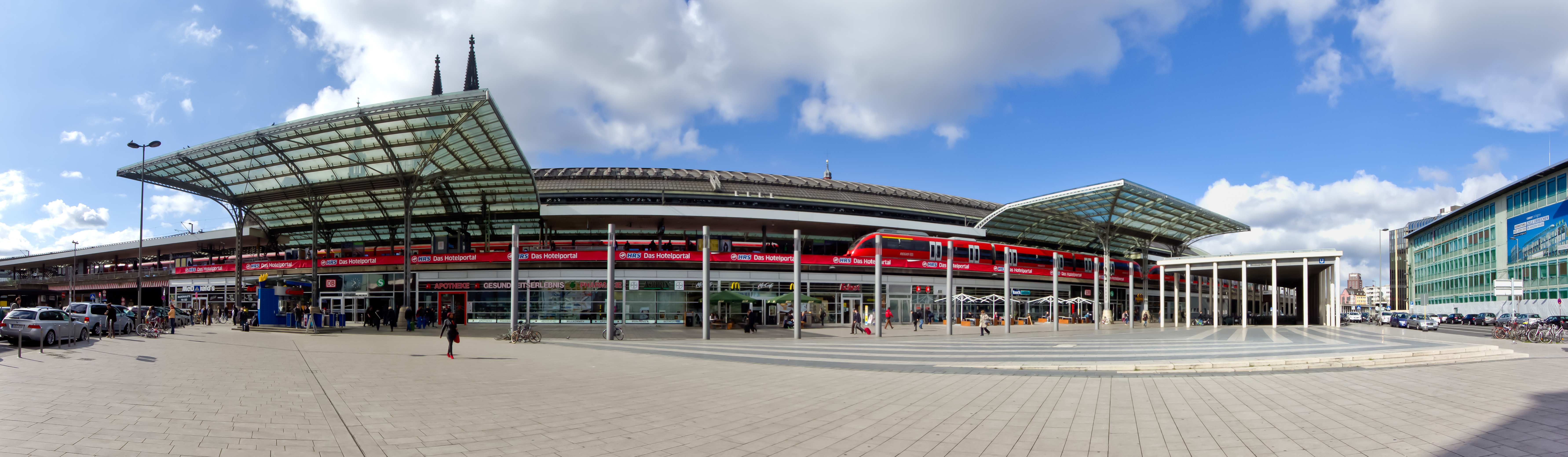 Breslauer Platz, hinter dem Hauptbahnhof Köln, nach der Neugestaltung 2013/2014